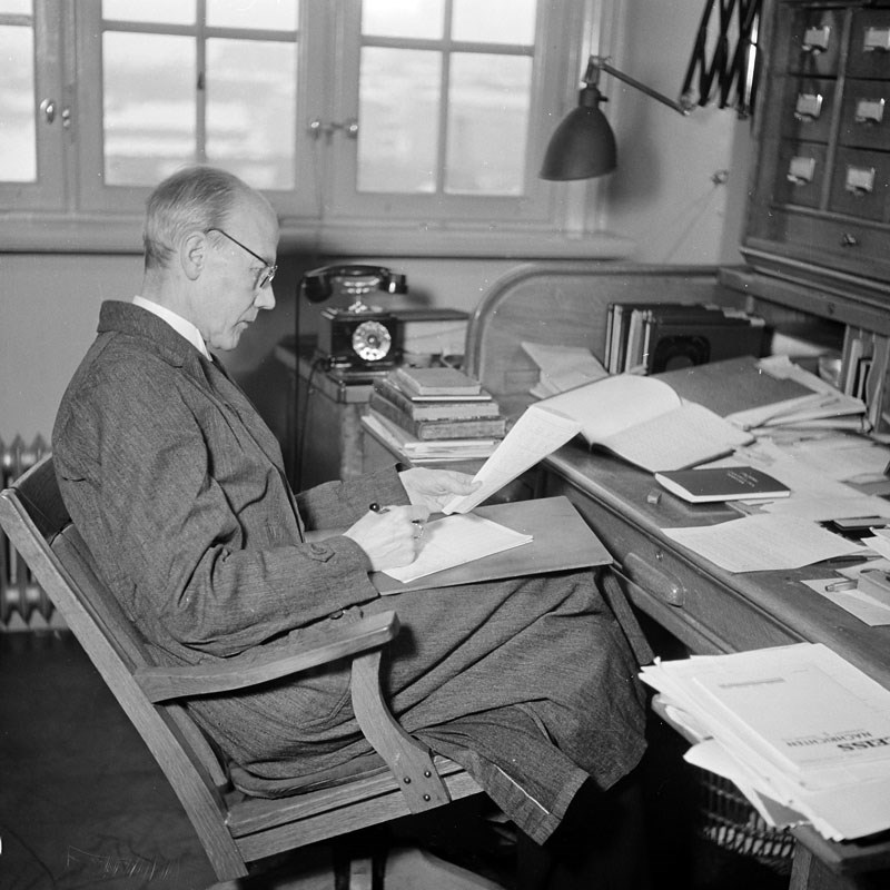 Arvid Odencrants, professor i fotografi, vid sitt skrivbord på Kungliga Tekniska Högskolan ca 1950